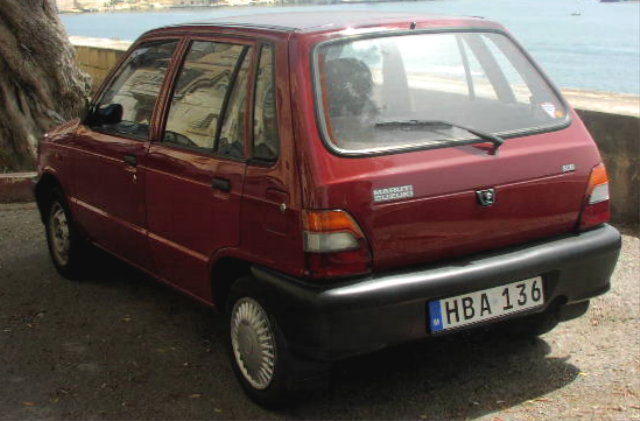 Maruti / Suzuki 800 hatchback